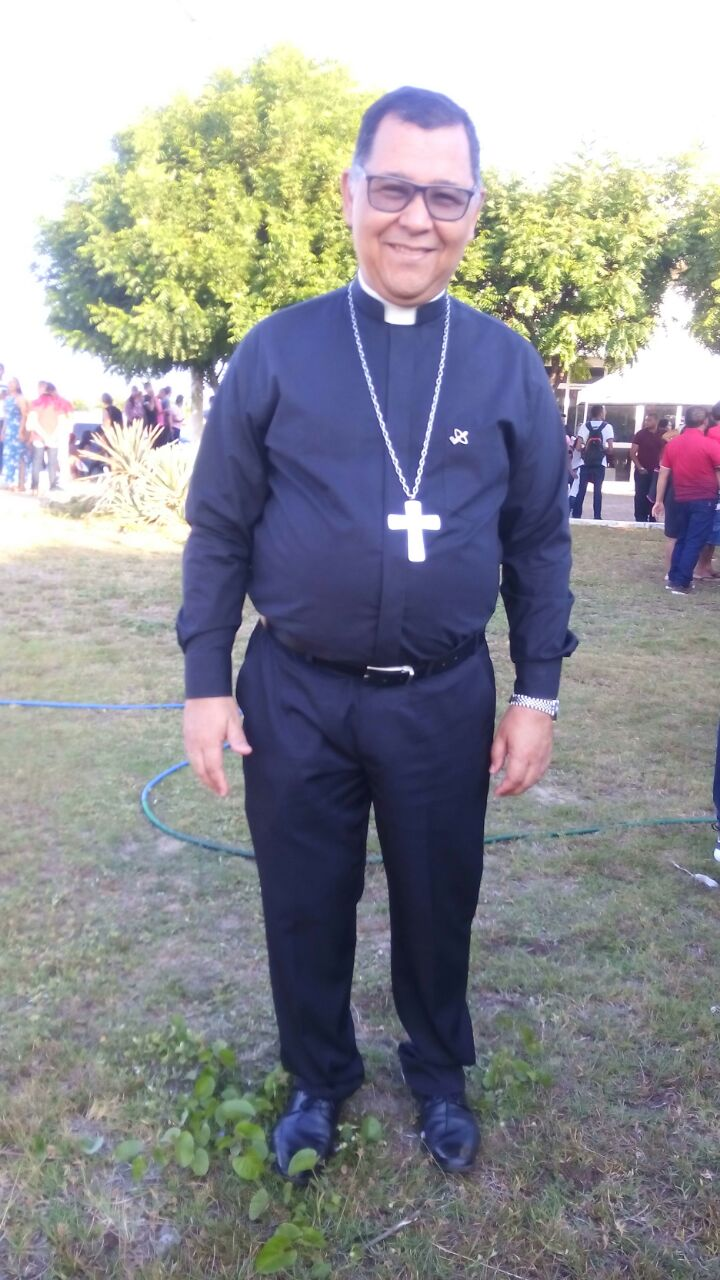 Um dos bispos prestigiando a posse de Francisco de Assis Gabriel dos Santos.